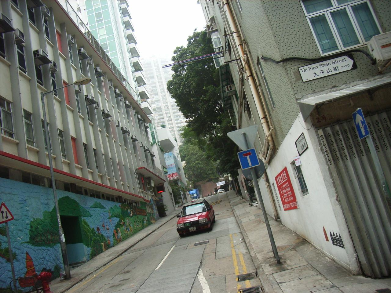 香港zh:上環zh:普仁坊zh:卜公花園, Sheung Wan, Hong Kong